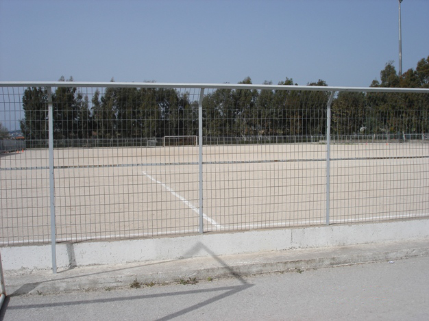 Fotis Aravantinos football center Patras Greece Αθλητικό κέντρο Φώτης Αραβαντινόε, Θύελλα Πατρών .